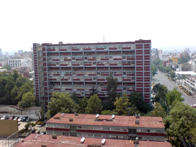 foto del multifamiliar alemán